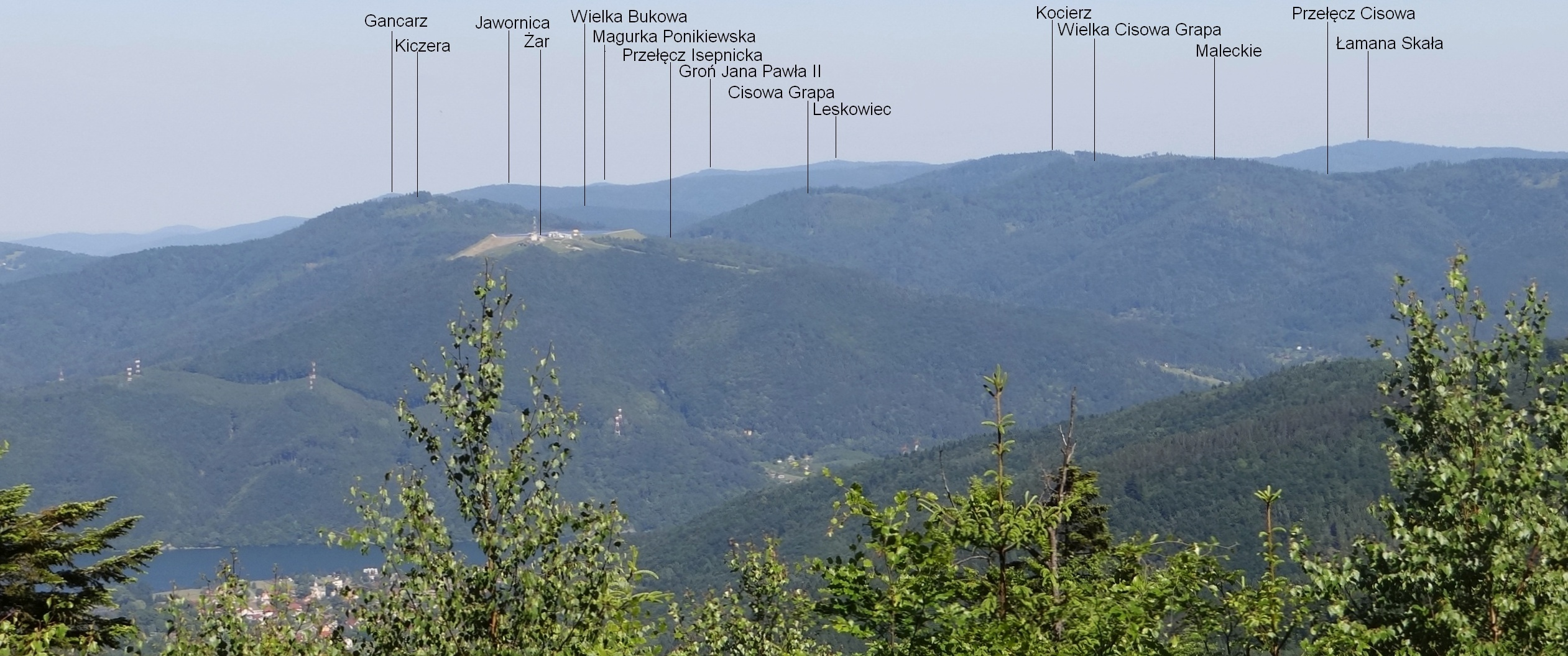 View from Magurka Wilkowicka